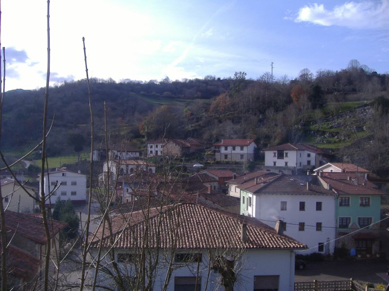 otra vista de puertas. posiblemente'l sitiu d'onde ta sacada sía un de los más afayadizos de tou'l pueblu